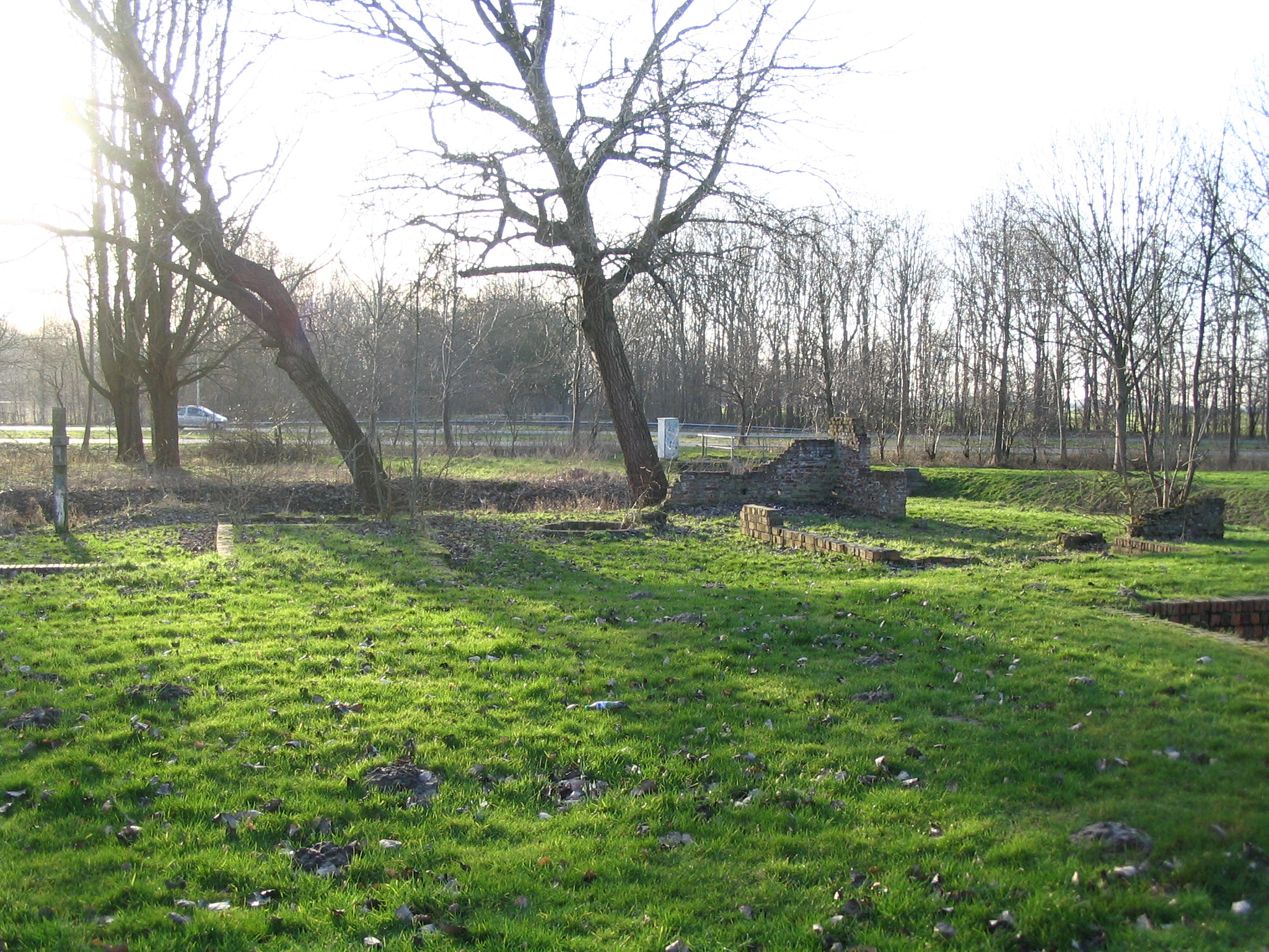 De overblijvselen van het gehucht Ladysmith nabij Delfzijl